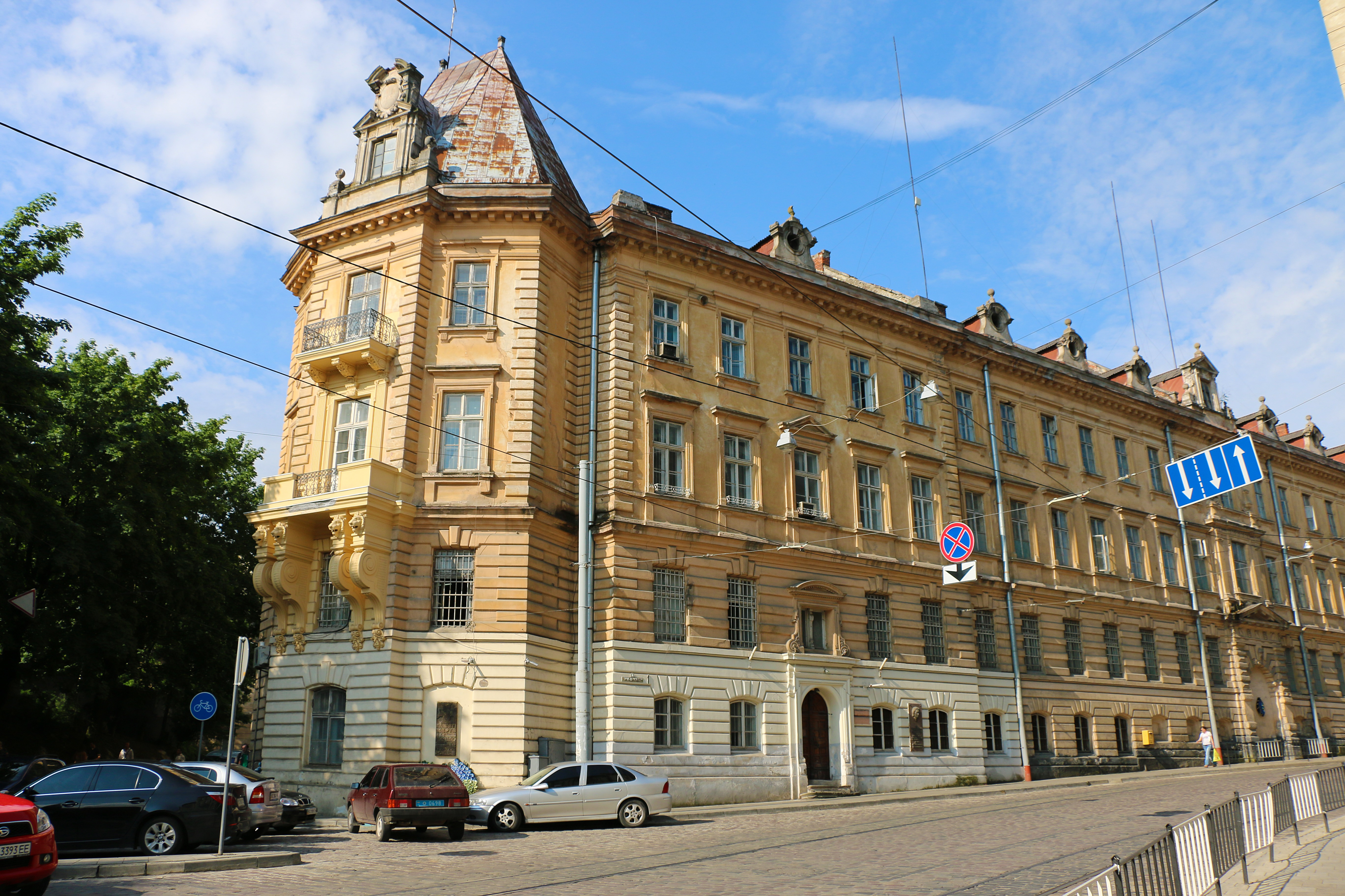 Адміністративний будинок («Тюрма на Лонцького»), Львів, Бандери С. вул., 1